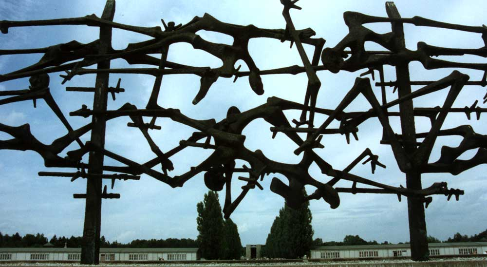 Taken and donated by user:Guinnog, 1997